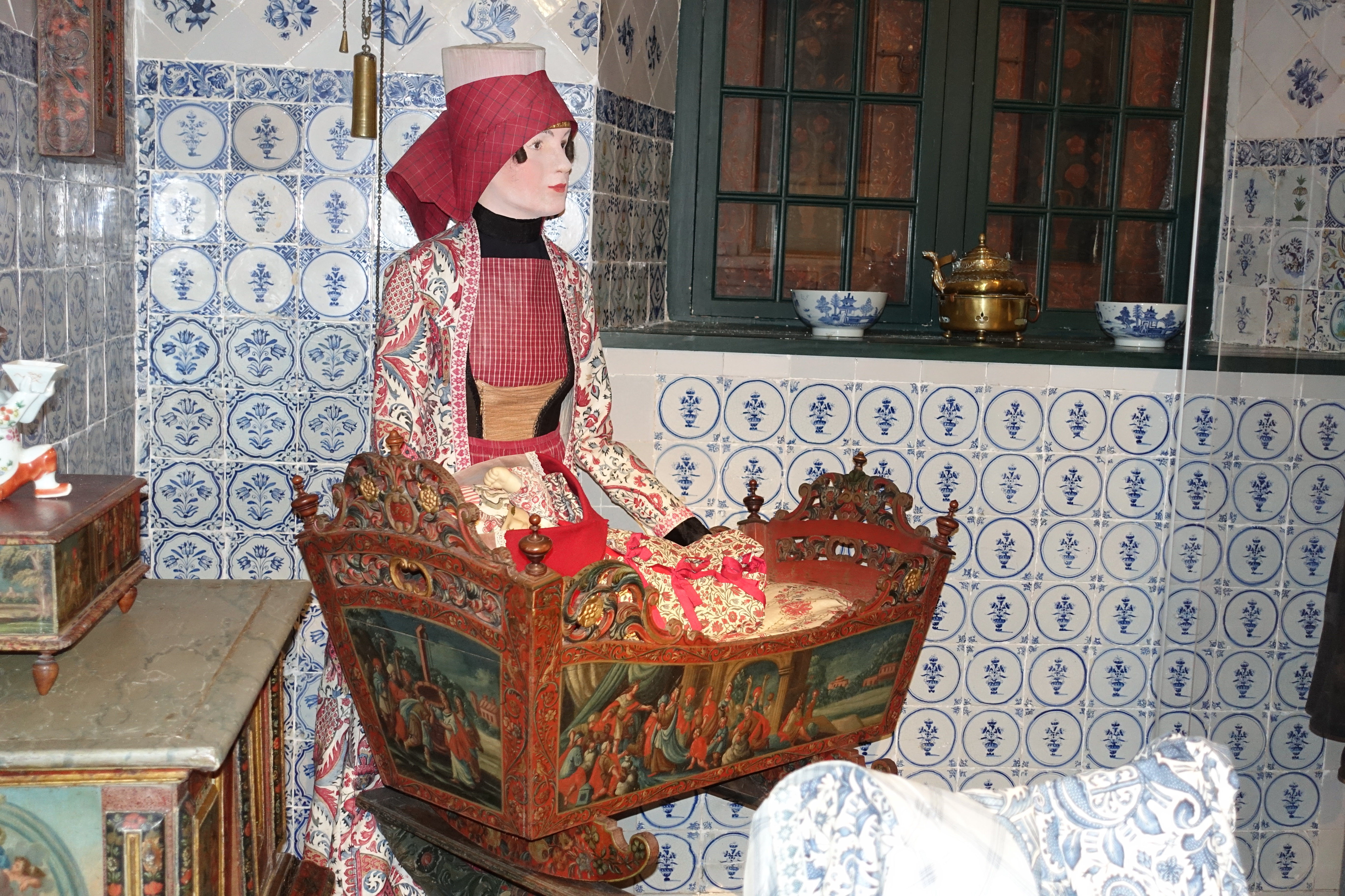 Streekdracht Hindloopen in Museum Hindeloopen